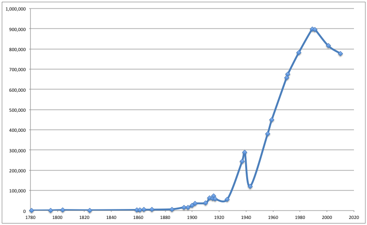 Vývoj počtu obyvatel města Záporoží, Ukrajina